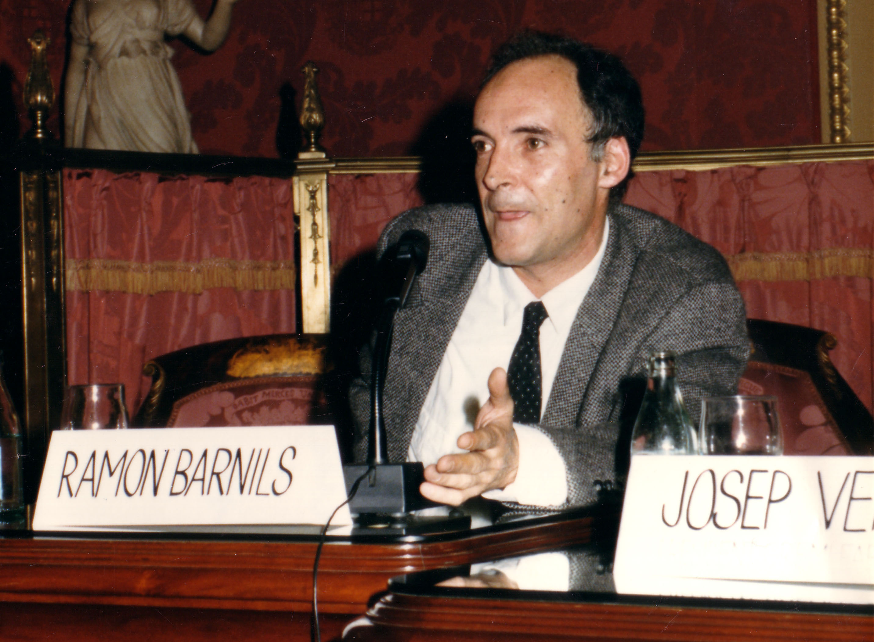 Adaptació retallada de la fotografia de Ramon Barnils a la Cambra de Comerç de Barcelona, maig 1988